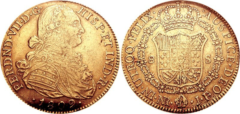 New Granada Ferdinand VII. King of Spain and Indias, 1808-1833. AV 8 Escudos. Nuevo Reino (Bogotá) mint. Dated 1809/8 JF/JJ. Draped and armored bust right Crowned coat of arms within Order chain. ME 16367; KM 66.1; Friedberg 60. In NGC slab graded AU 55. Rare.